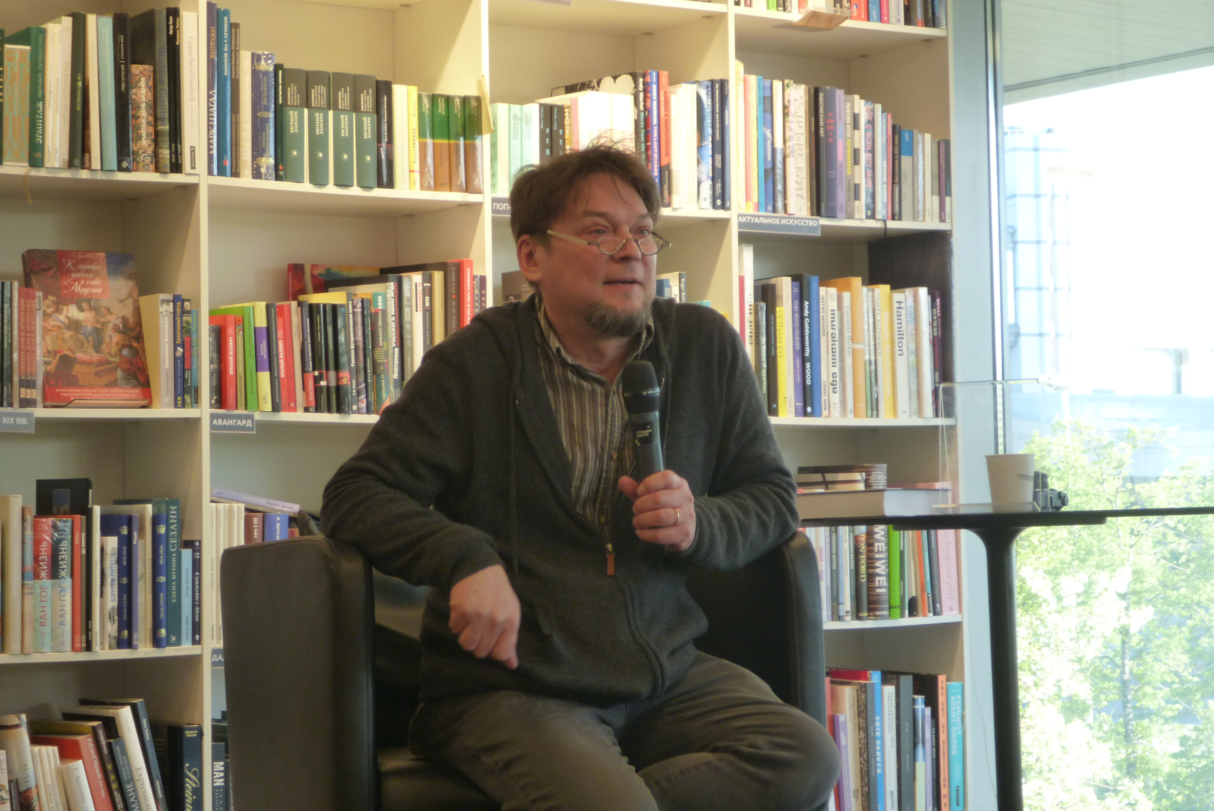 Сергей Александрович Ушакин в Ельцин-центре (в магазине Пиотровский) 25 мая 2019 года